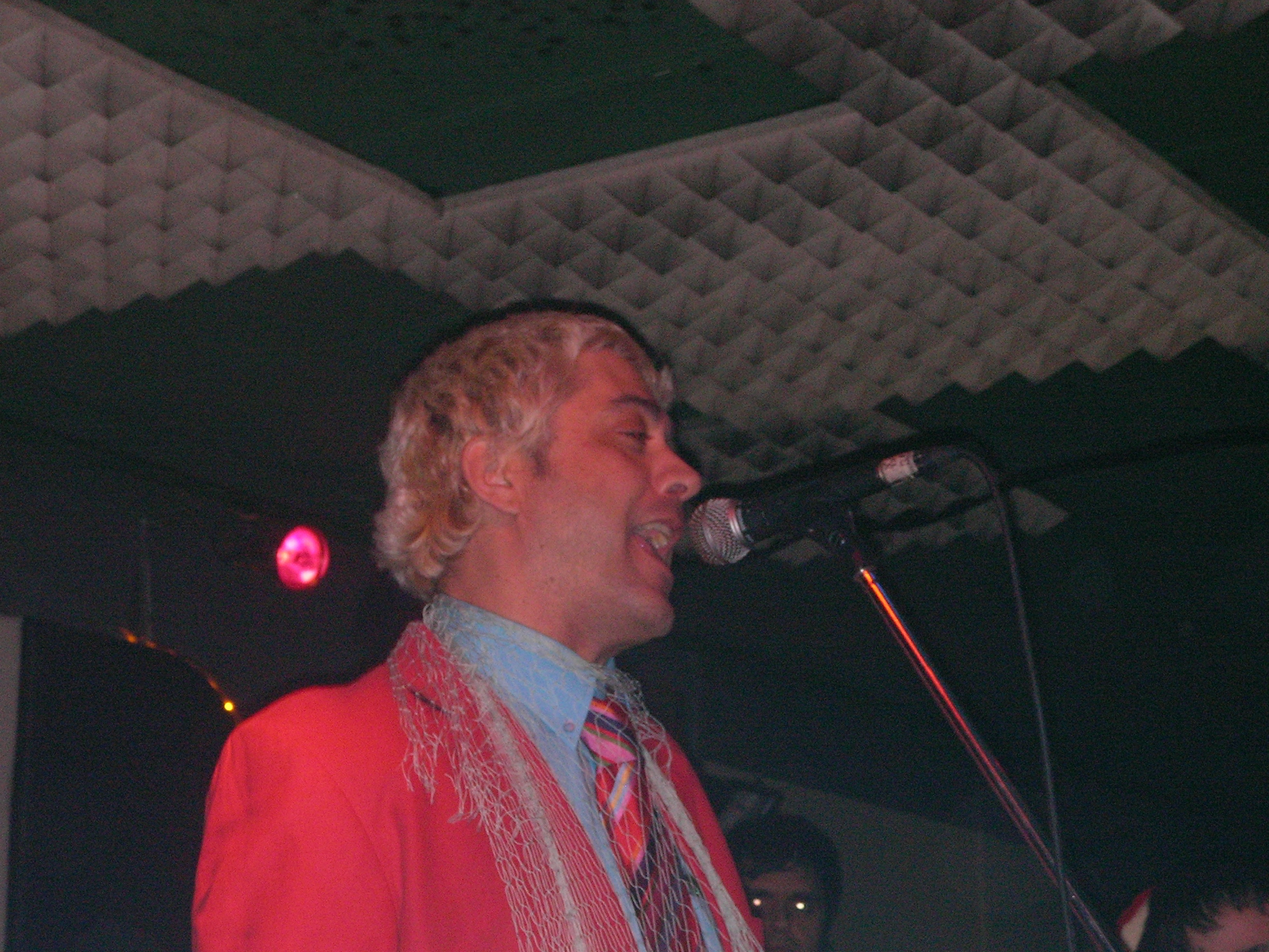 Olav Fernández, vocalista de Lkan durante el concierto de la Sala Wah Wah de Valencia (España)